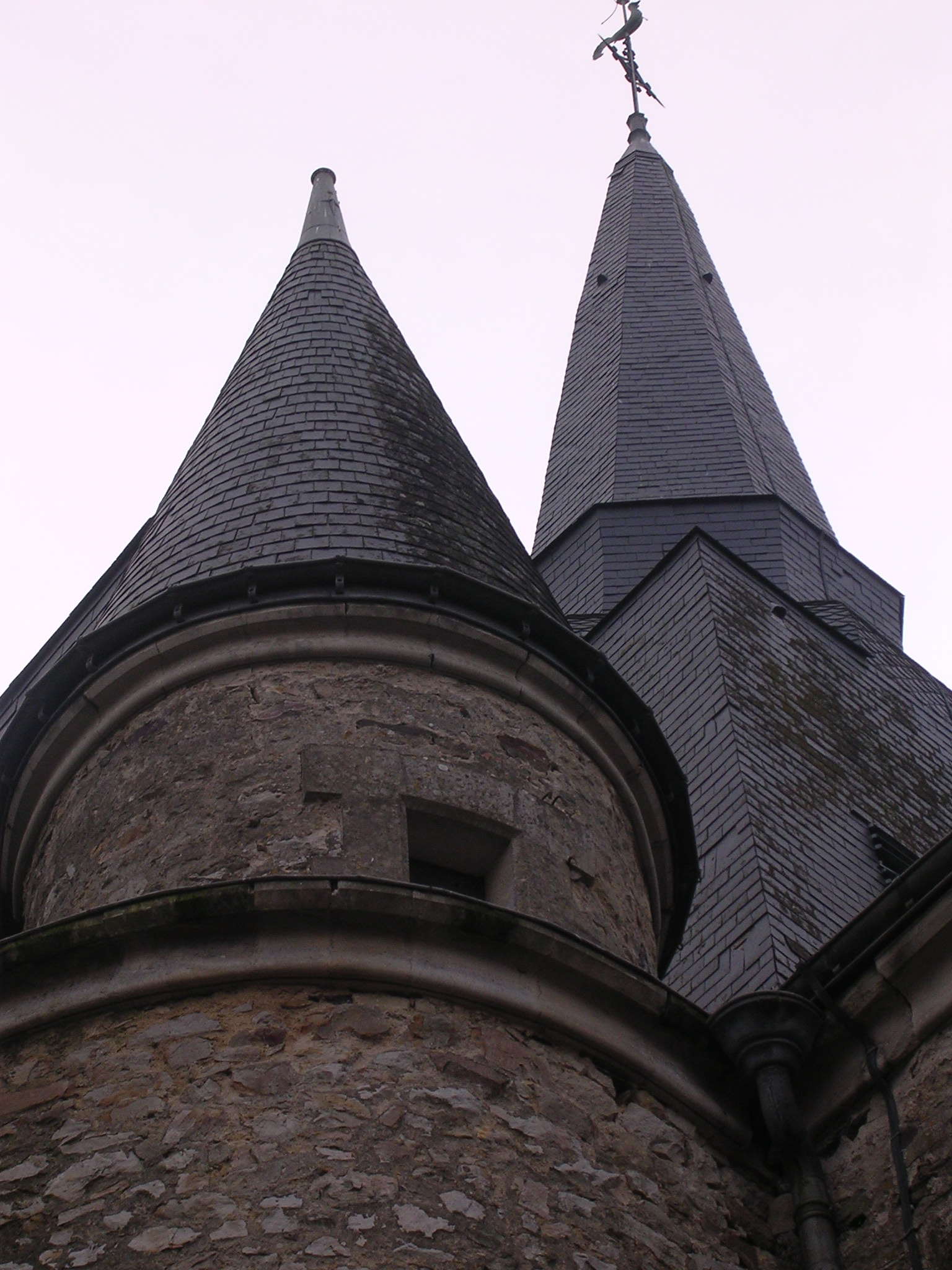 Clocher de l'église de Sainte-suzanne (Mayenne)